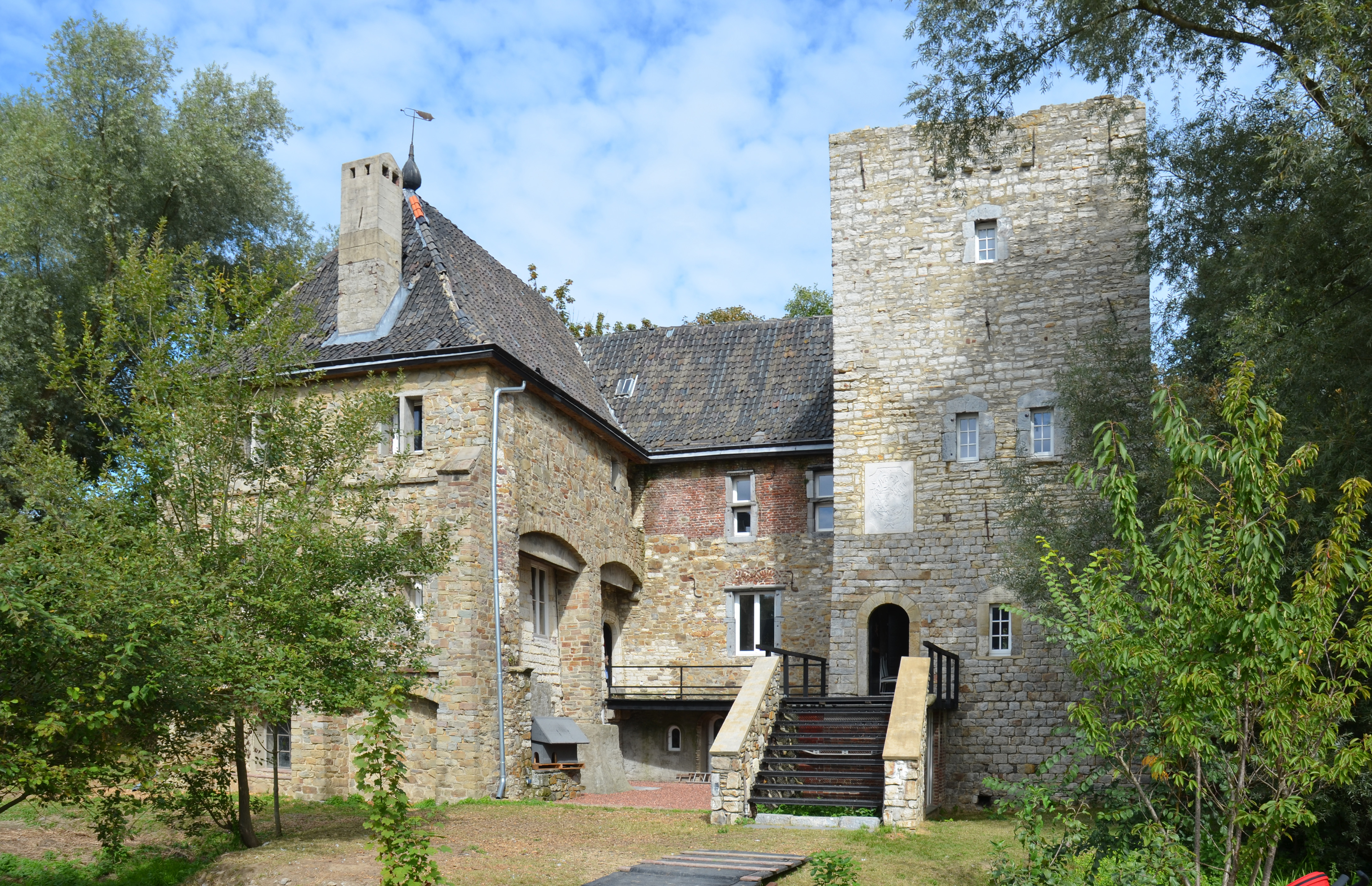 Das Soerser Haus in Aachen-Laurensberg, Ansicht von SüdenThis is a photograph of an architectural monument., no. 0